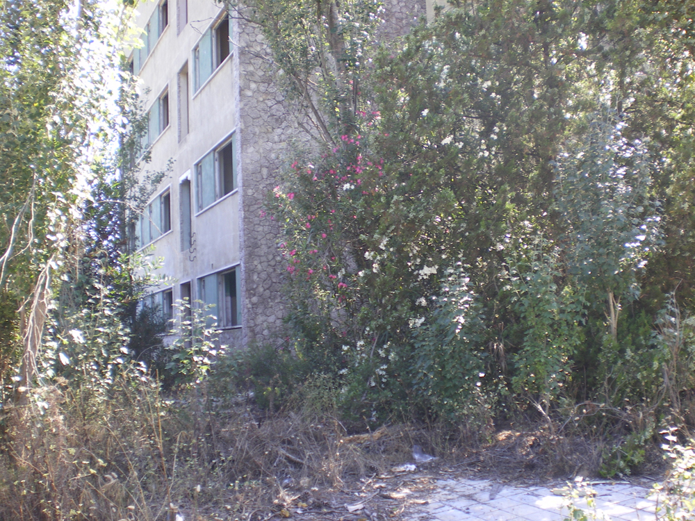 Hotel que servia o complexo turístico do Muxito